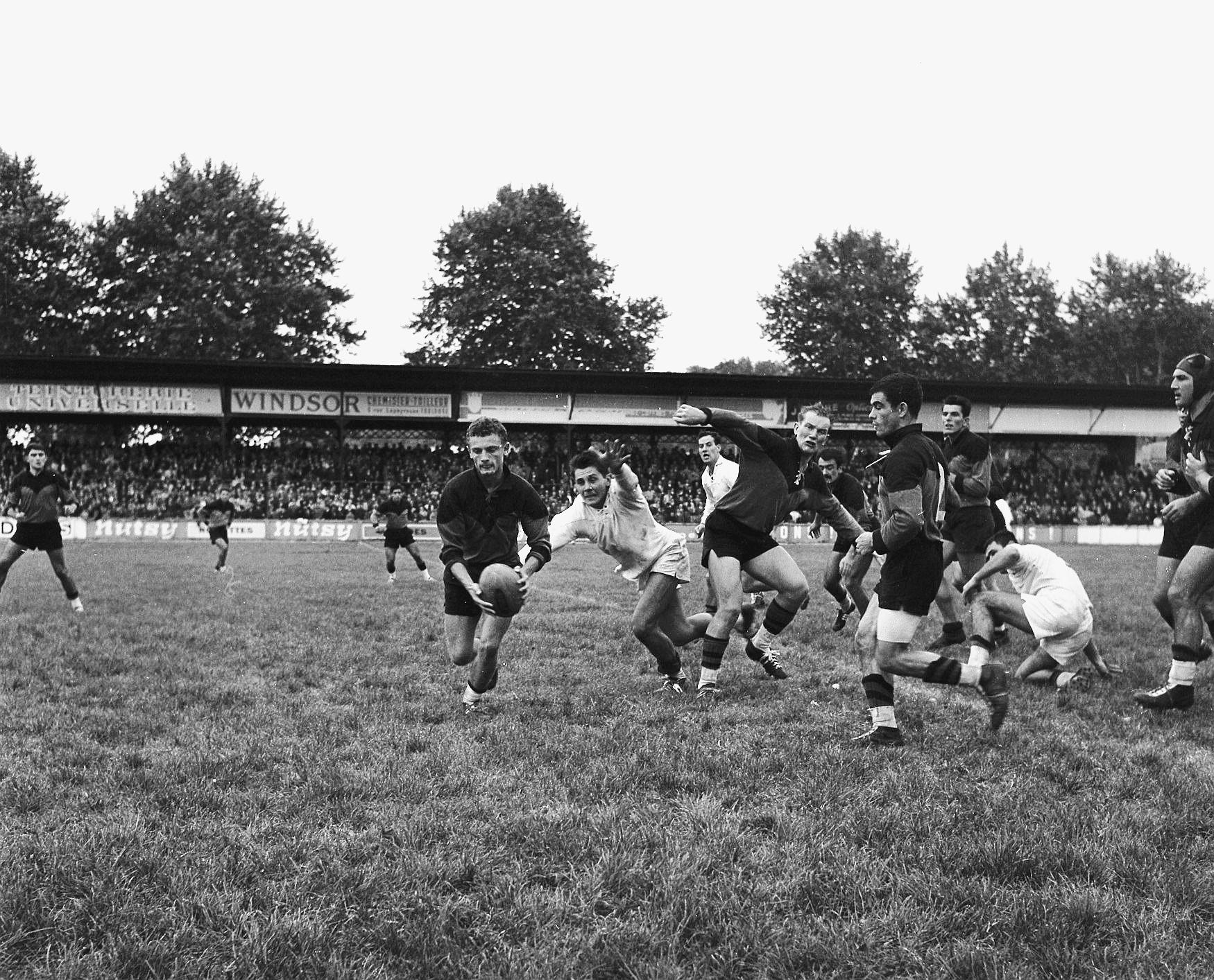 Stade Ernest Wallon. Le 28 Octobre 1962. Vue de la rencontre entre le Stade Toulousain et Montauban.